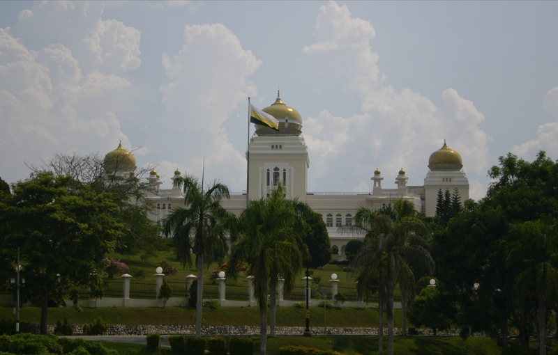 Istana Iskandariah Bukit Chandan Kuala Kangsar